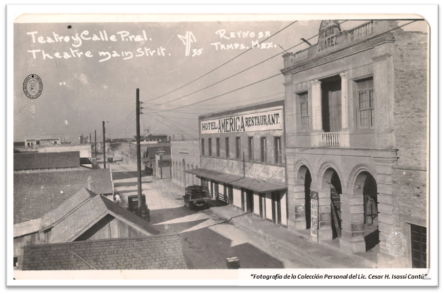 Documentos históricos de Reynosa, Tamaulipas.